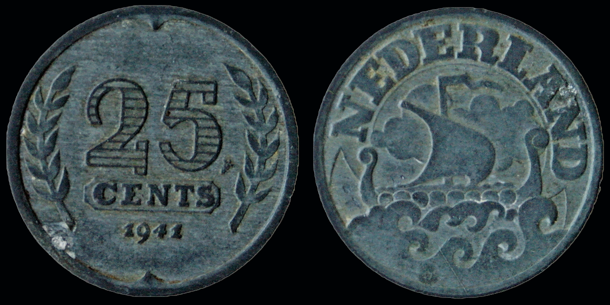 zinken kwartje WOII 1941 voor- en achterkant